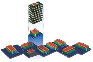 Esempio di multifocus